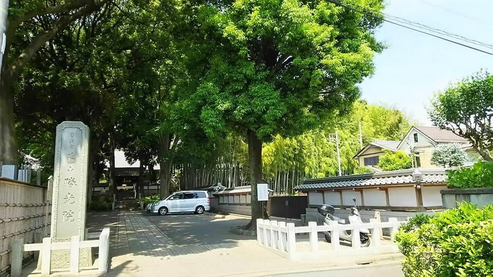 世田谷勝光院＿入り口